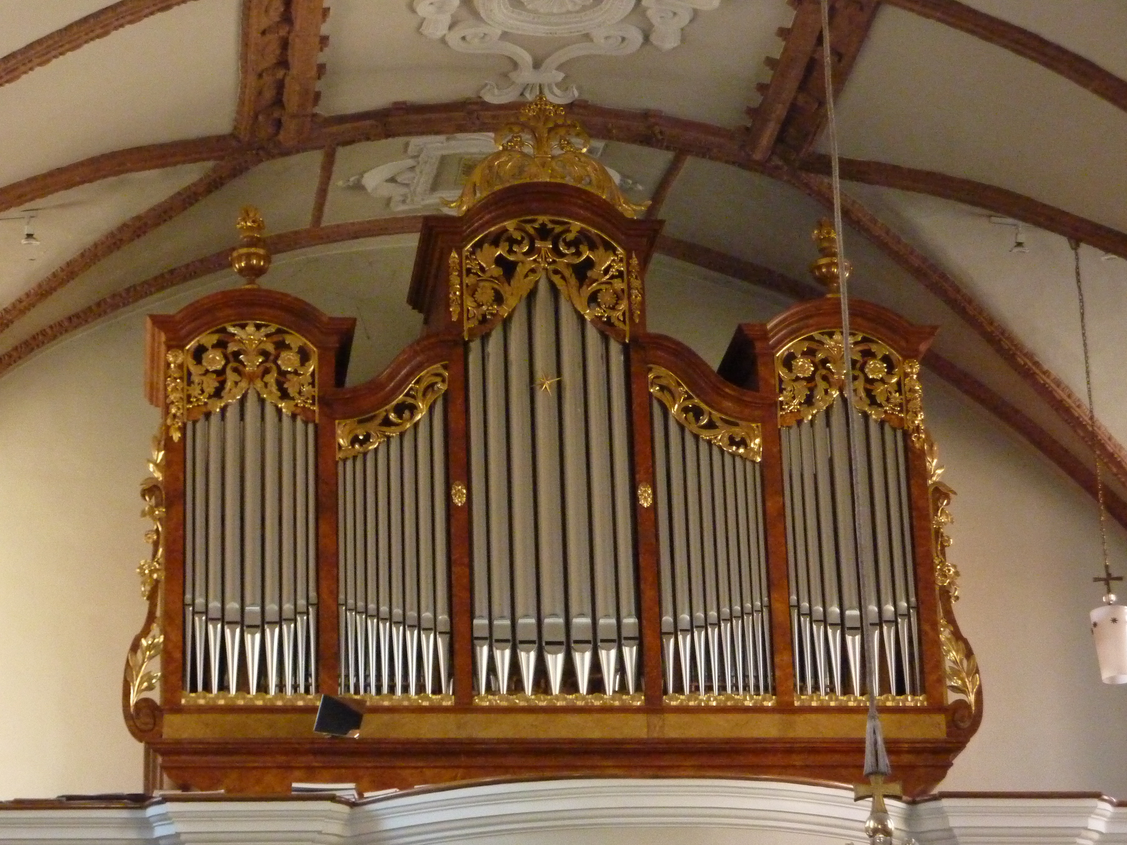 Kath. Filialkirche Marktkirche hl. Georg, Kirchenplatz, Horn, Niederösterreich - Orgel: Gehäuse Anton und Johann Pfliegler, 1806; Werk Gebrüder Rieger 1914